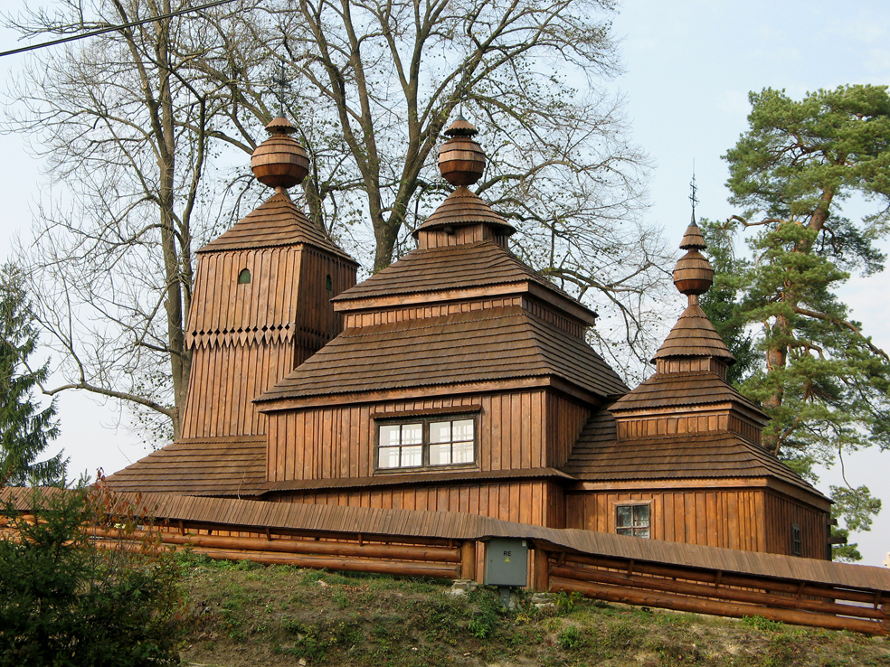 Cerkva svätého Mikuláša v novej eteriérovej uprave